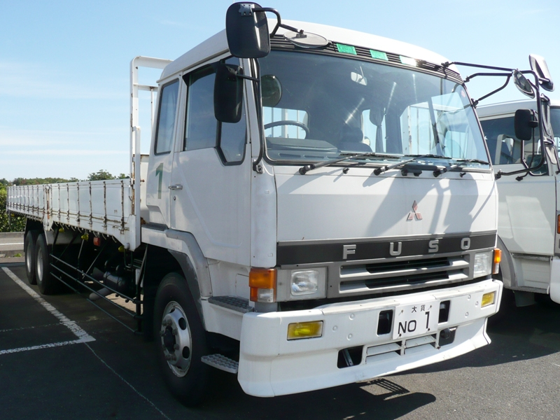 全国白バイ安全運転競技大会にて撮影。